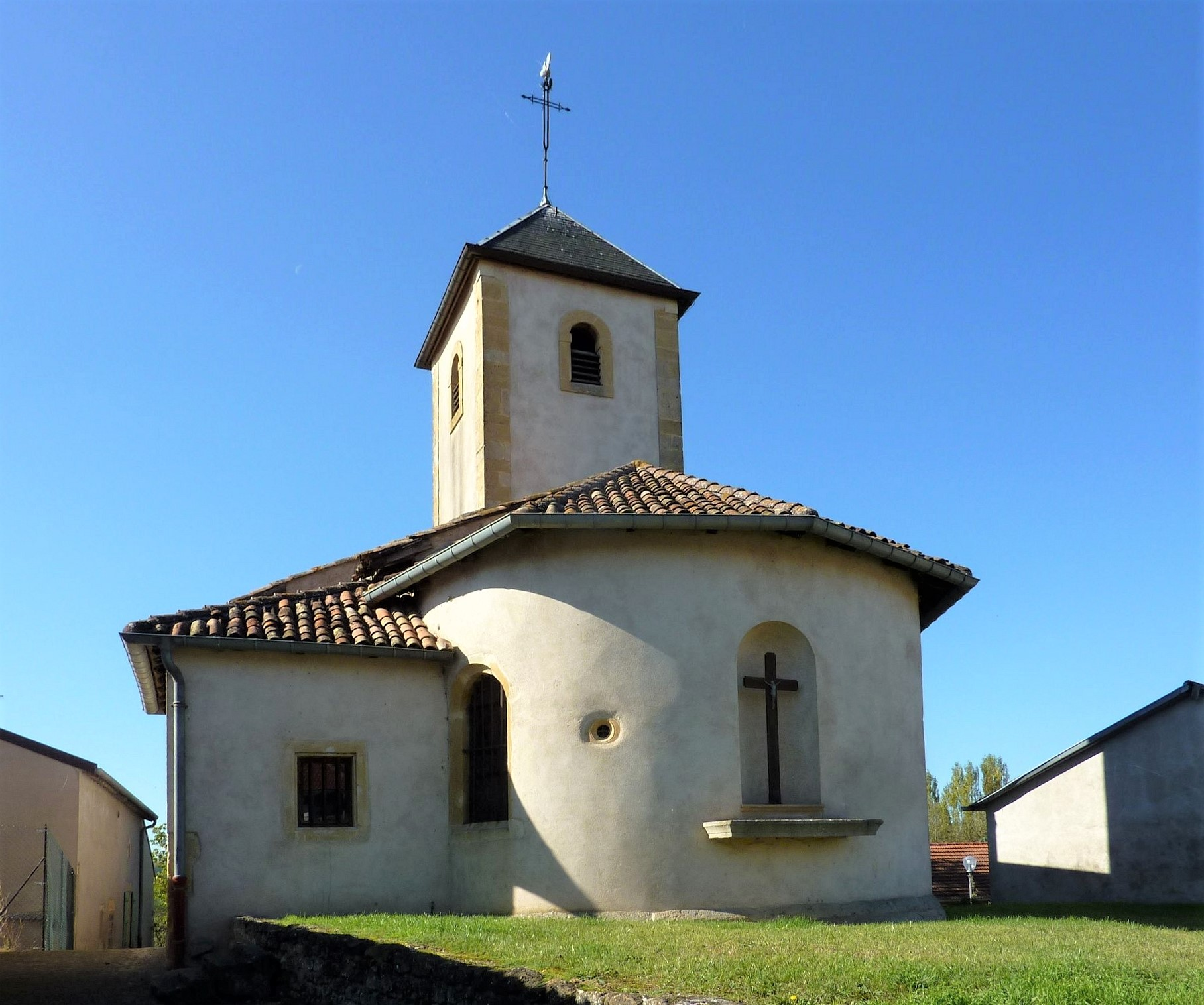 Église St-Gorgon de Ville-sur-Yron